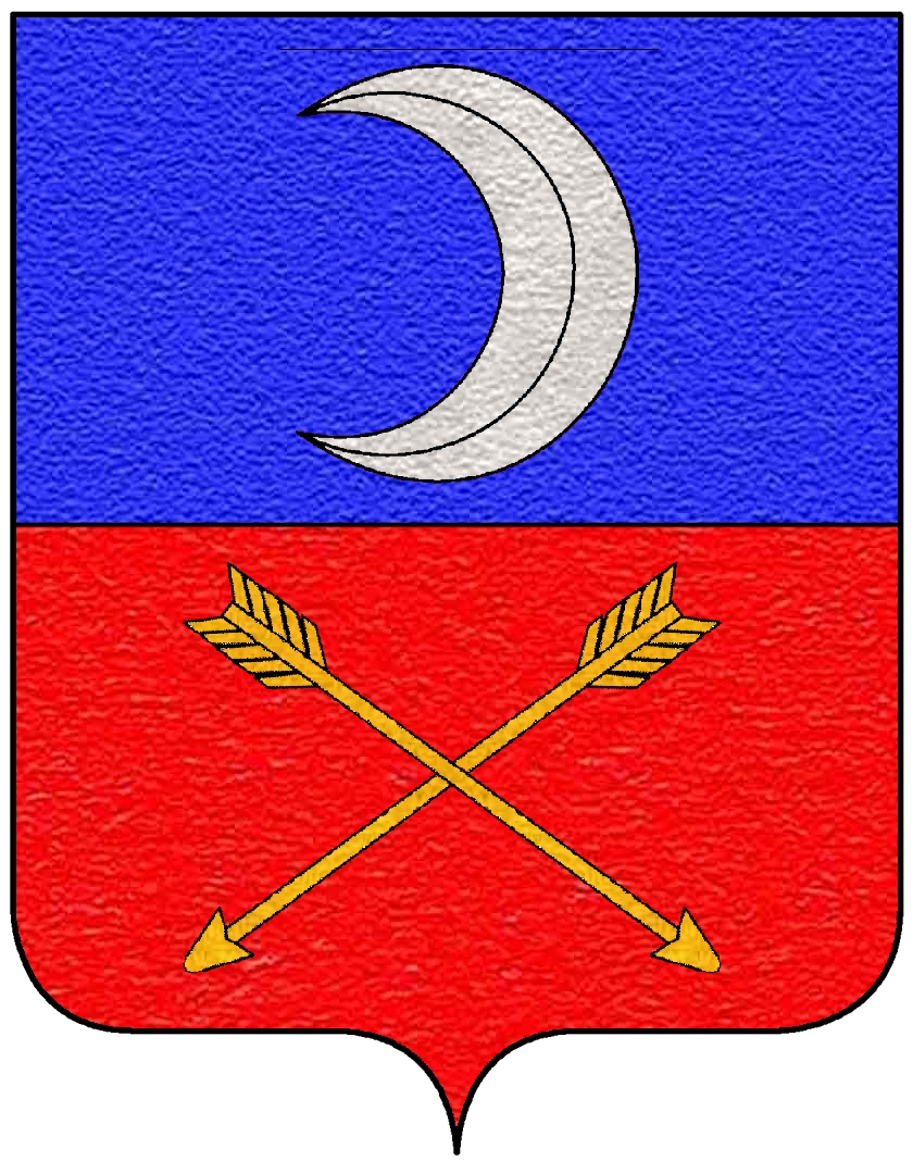 Stemma della famiglia Farsetti